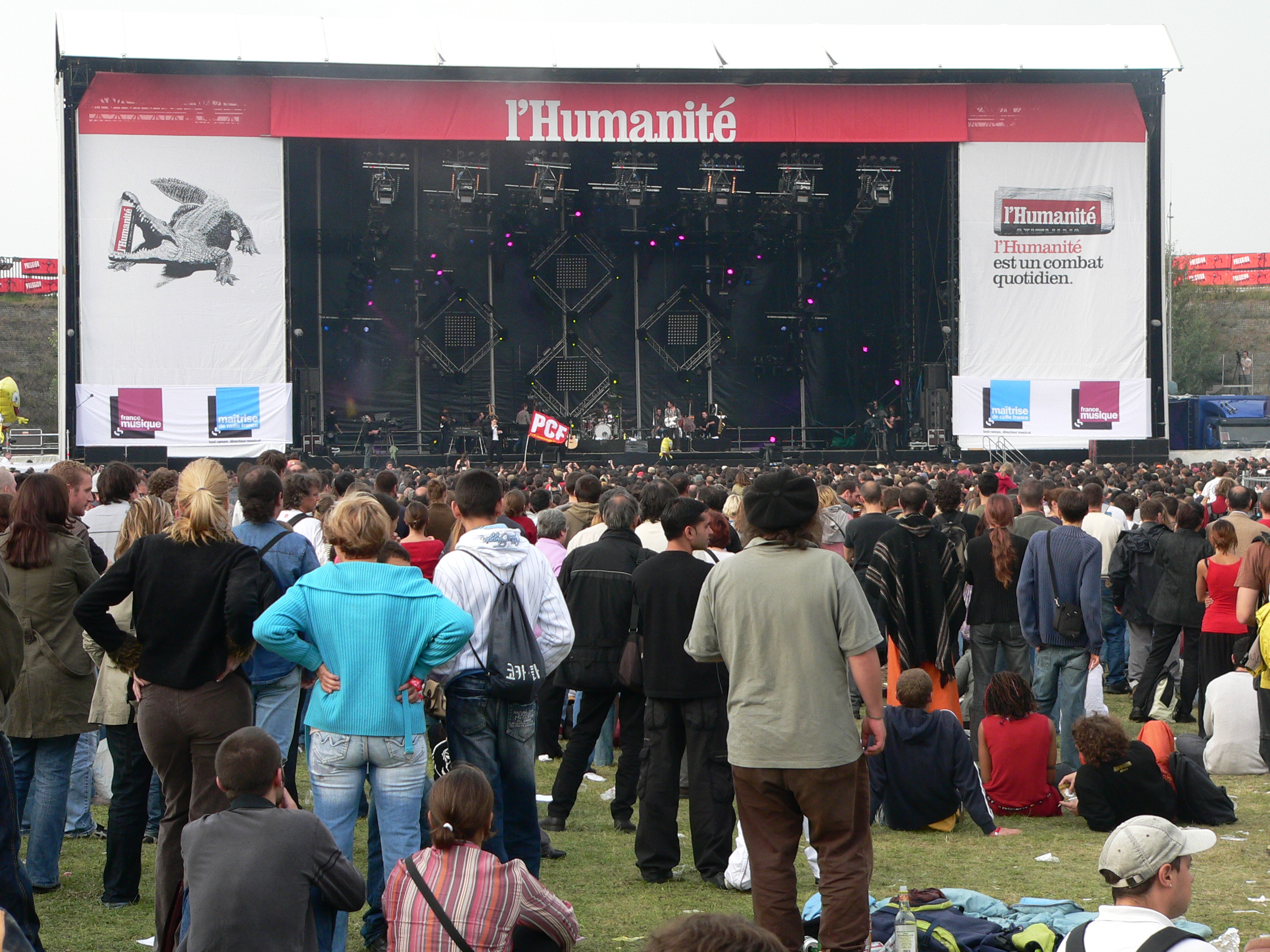 Fête de l’Humanité, 15 July 2006-17 July 2006